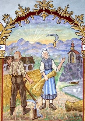 Sichelwunder der Notburg in der Kapelle in Wawern in der Eifel